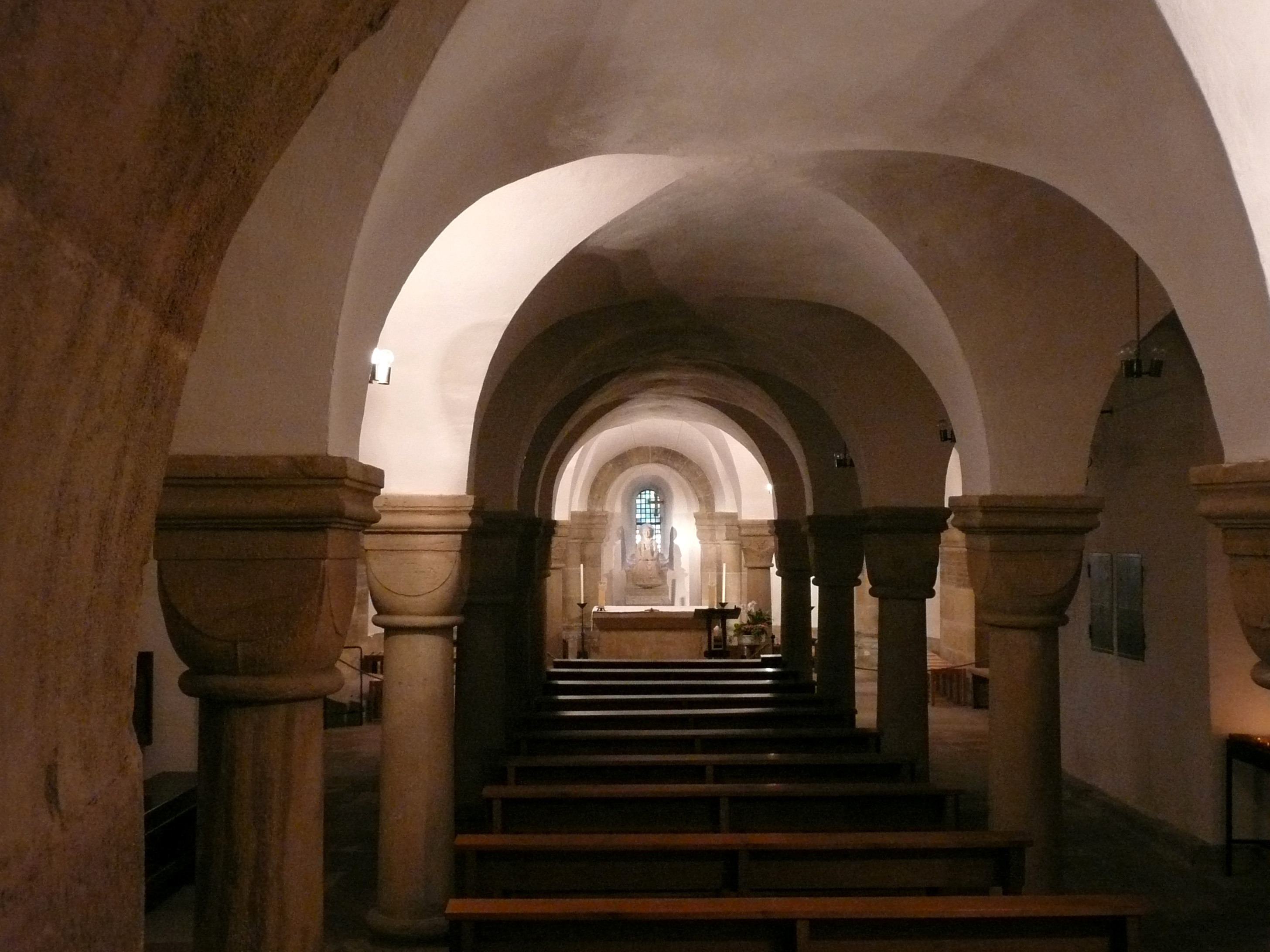 Hauptkrypta im Fritzlarer Dom, Ansicht von W. This is a photograph of an architectural monument.